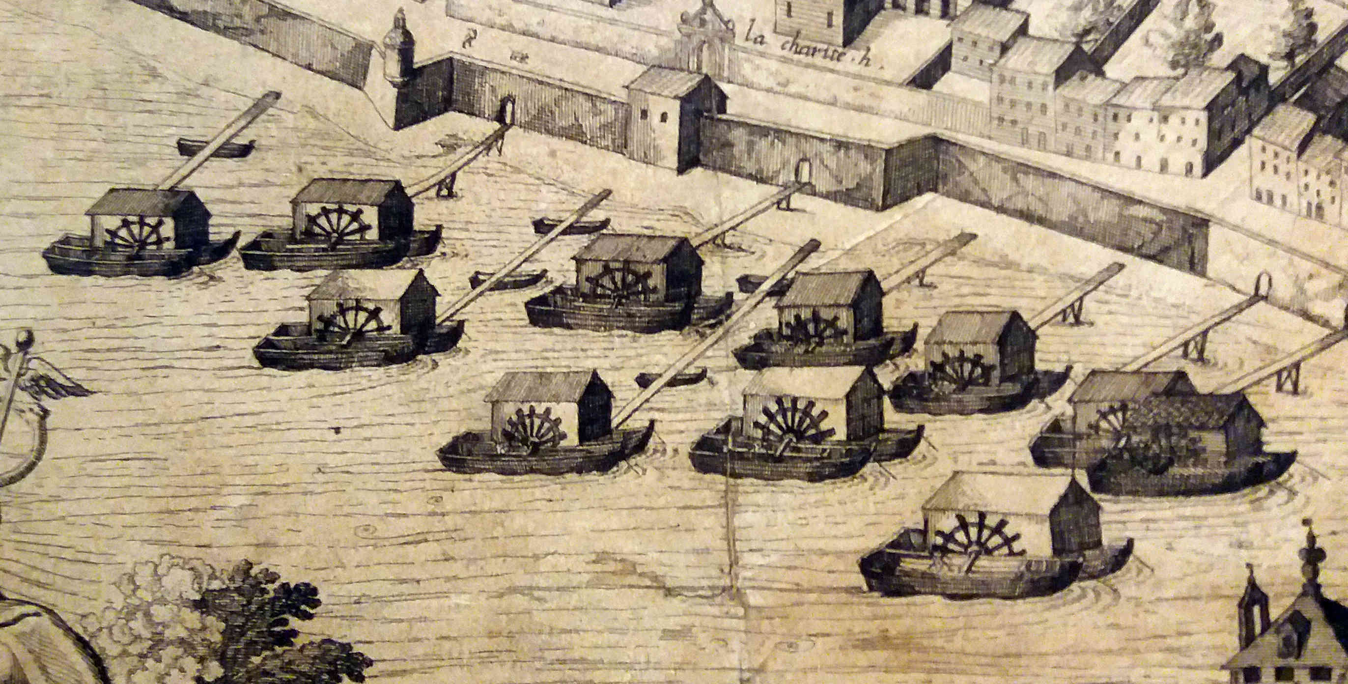 Grande vue de Lyon, de Simon Maupin, 1625 : détail sur les moulins flottants du Rhône.